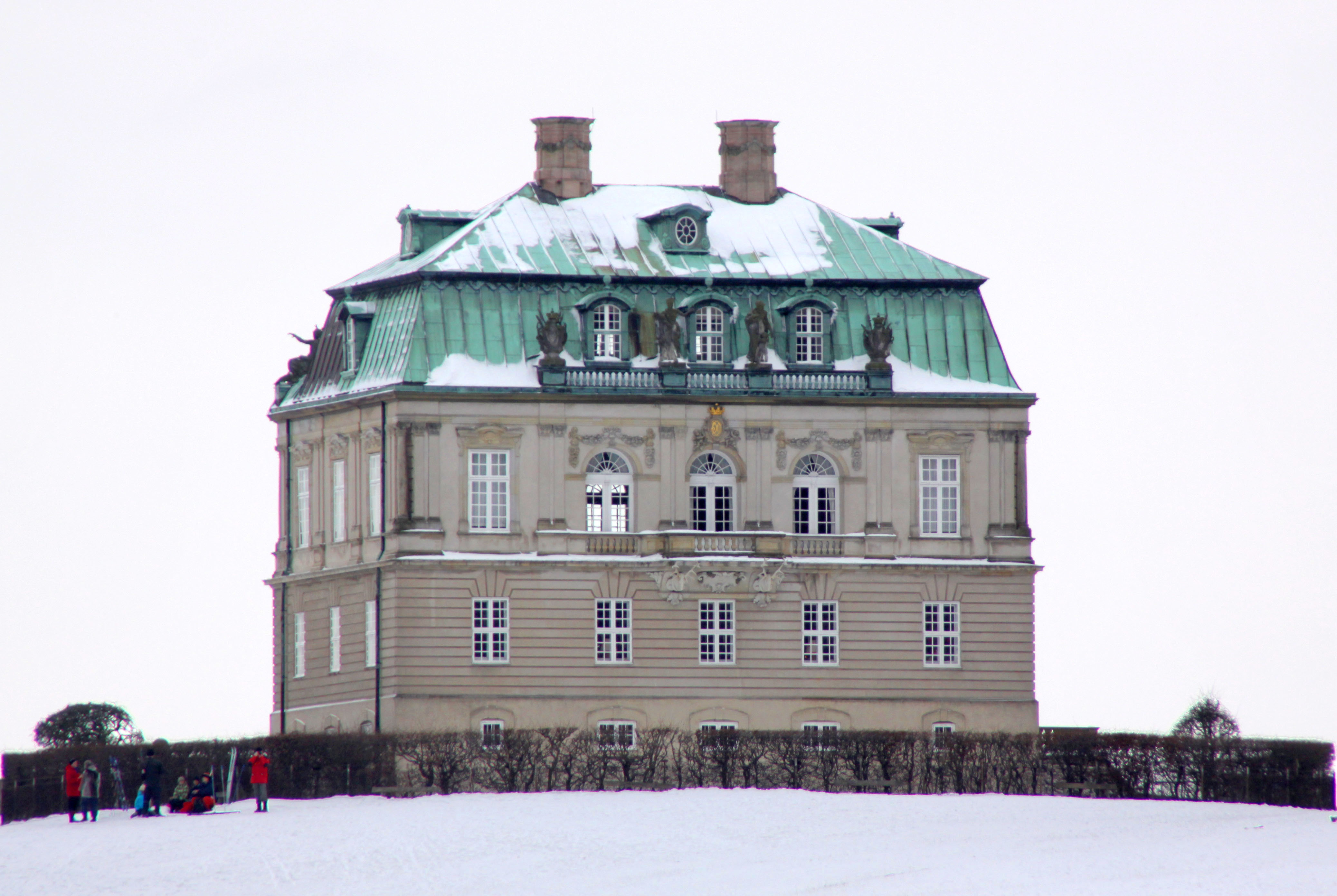 Klampenborg. Eremitageslottet på Dyrehaven.